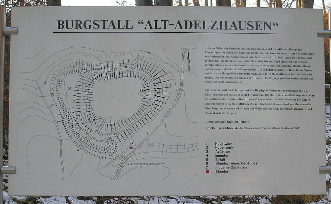 Infotafel unter der Burg